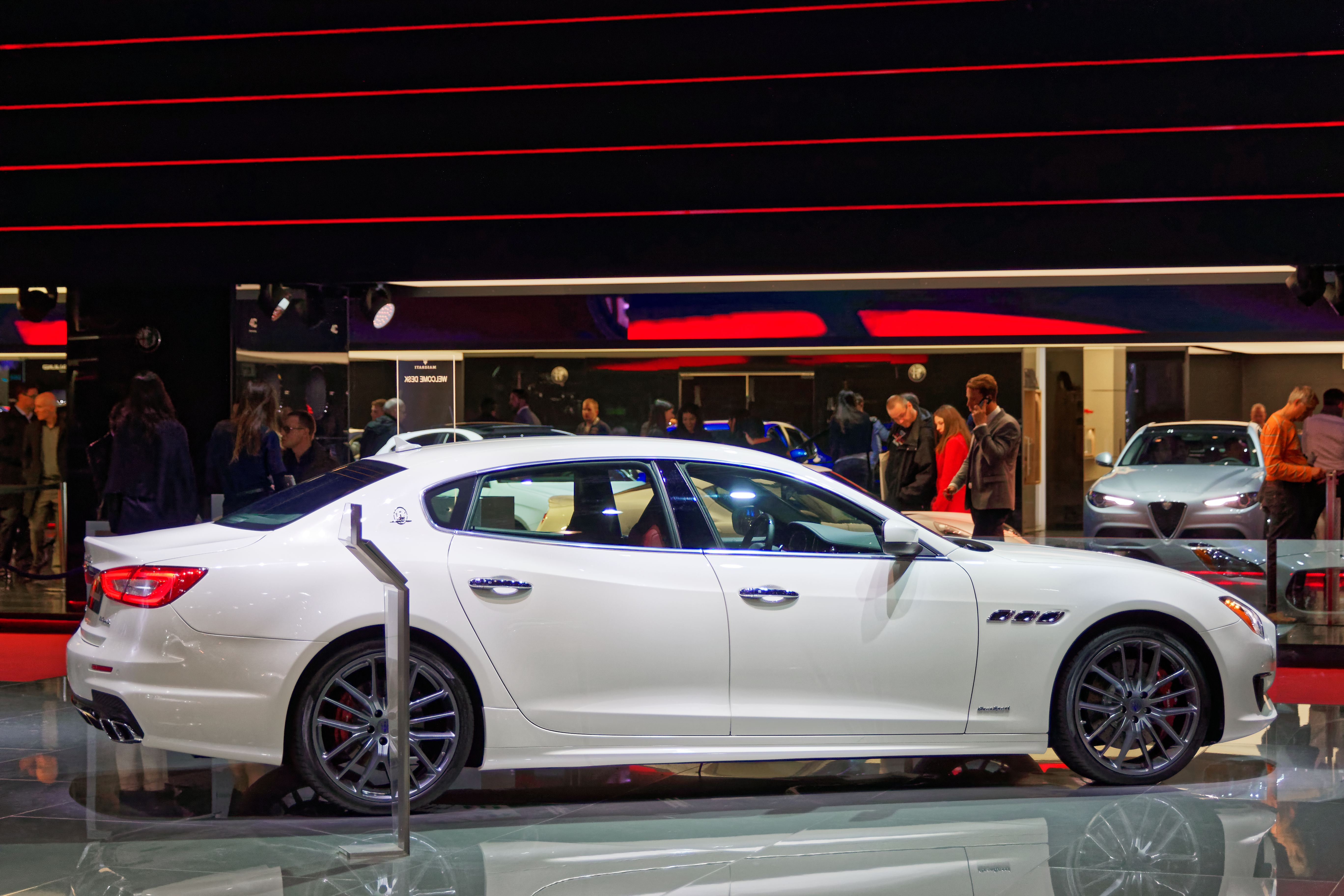 Une Maserati Quattroporte présentée lors du mondial de l'automobile de Paris 2016.